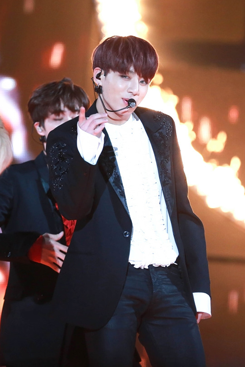 Jeon Jung-kook at 8th Melon Music Awards on November 19, 2016.